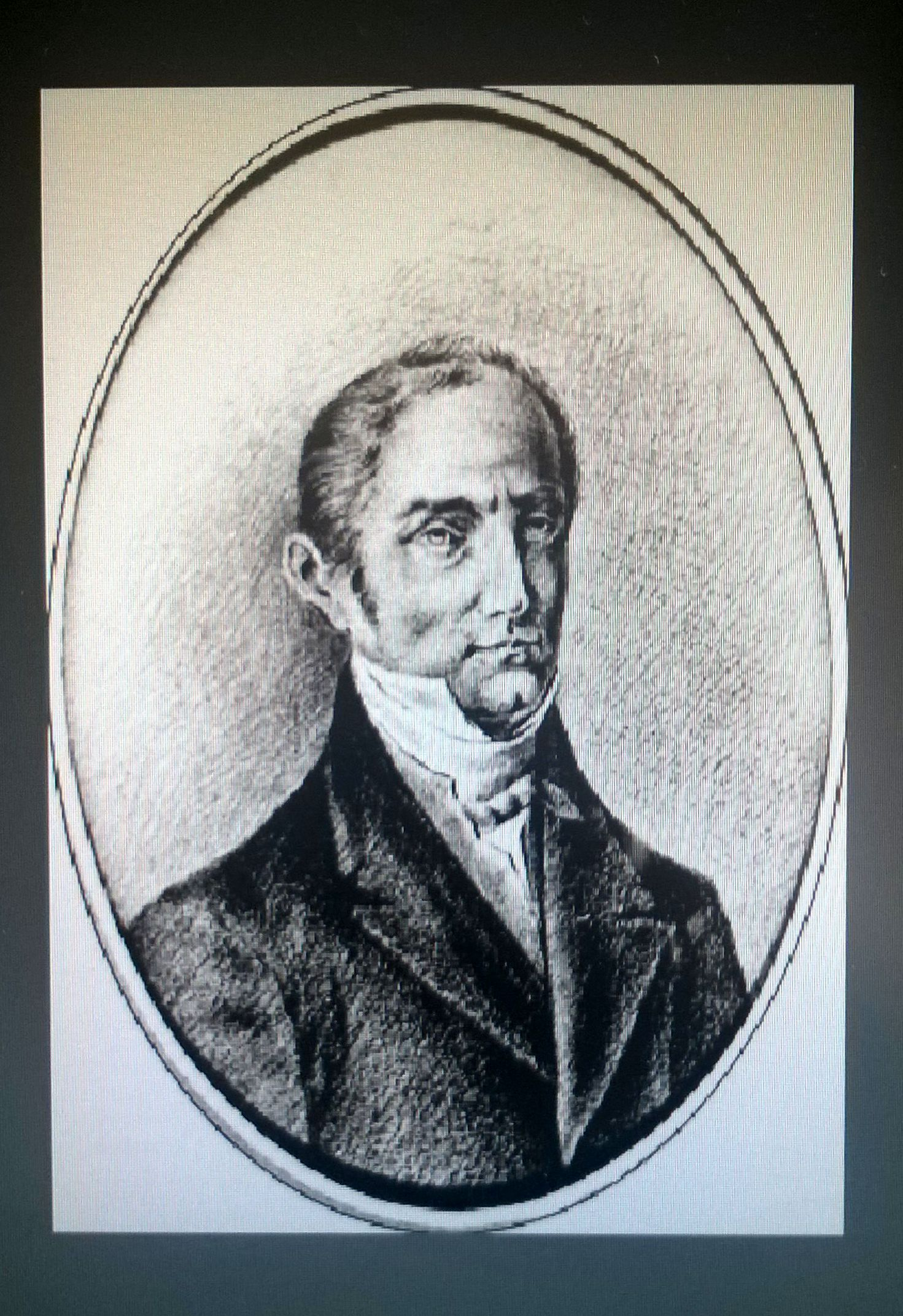 Ritratto di Giosuè Sangiovanni , celebre zoologo e fervente patriota due volte deputato al Parlamento Napoletano.